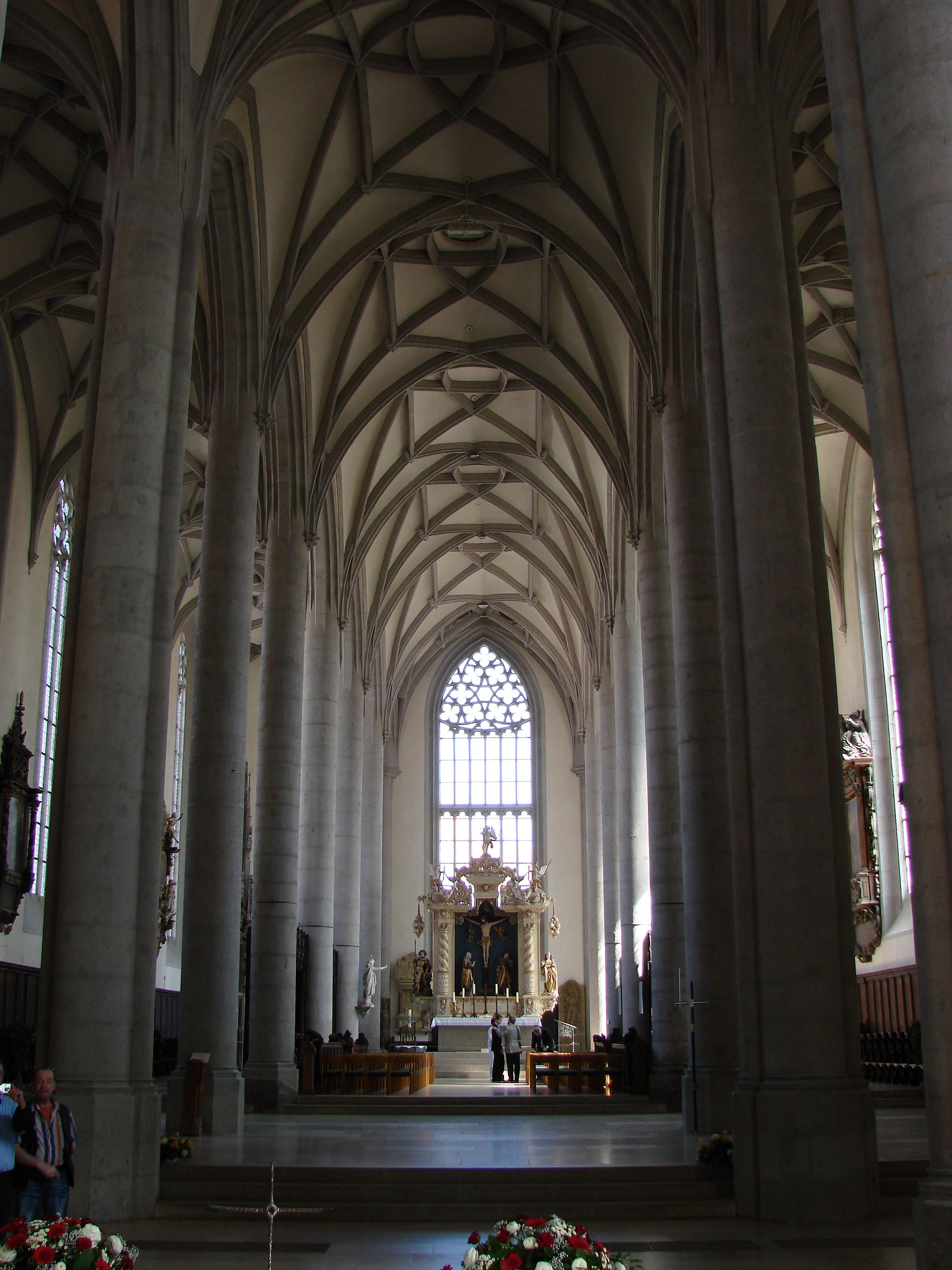 Nördlingen, Germany, St. George's church, main nave